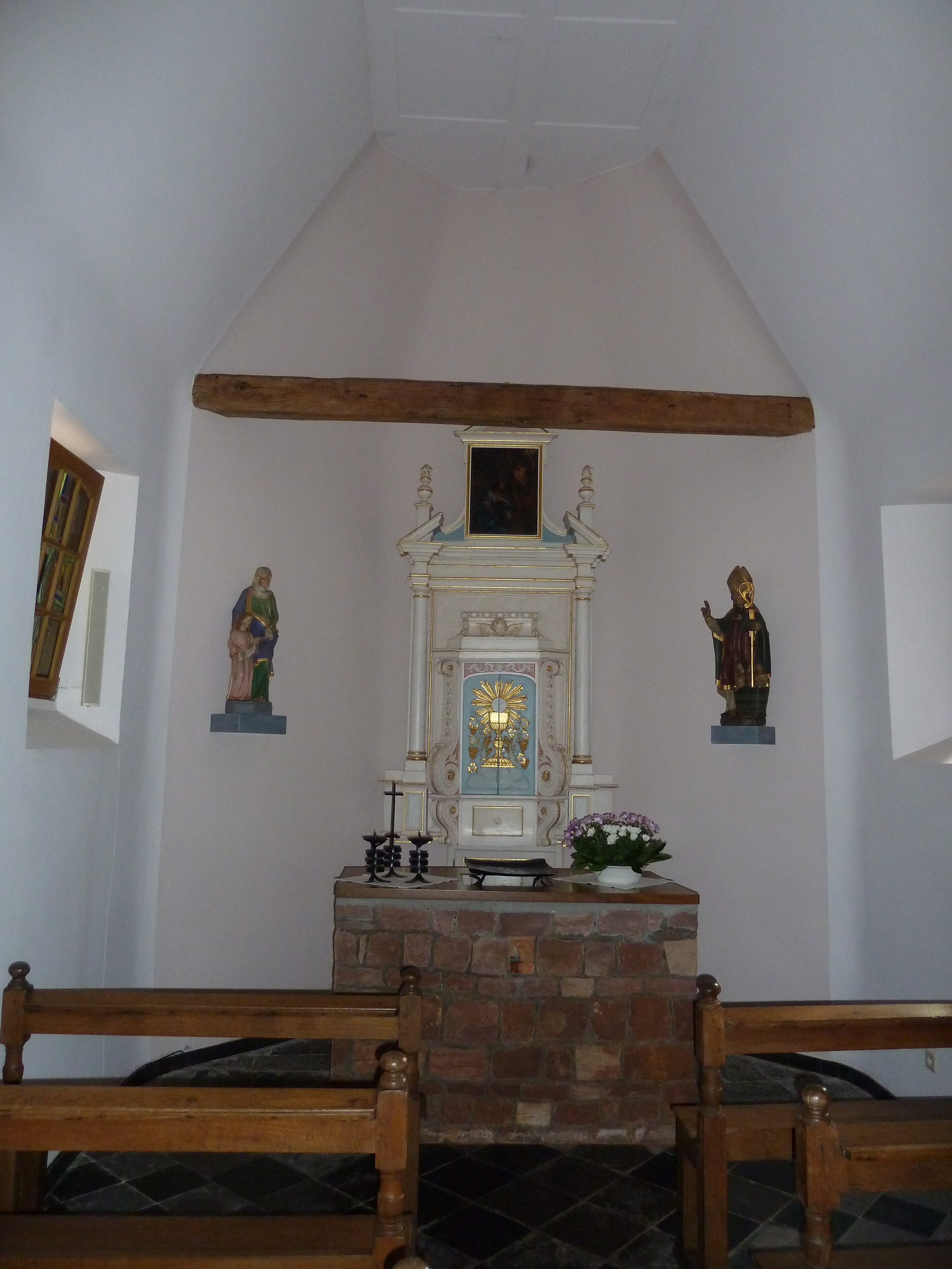 Sint-Annakapel, Raeren, België